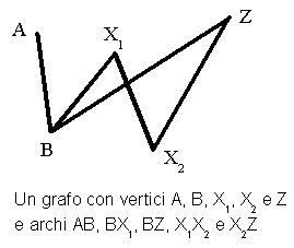 Esempio grafo, disegnato ex novo